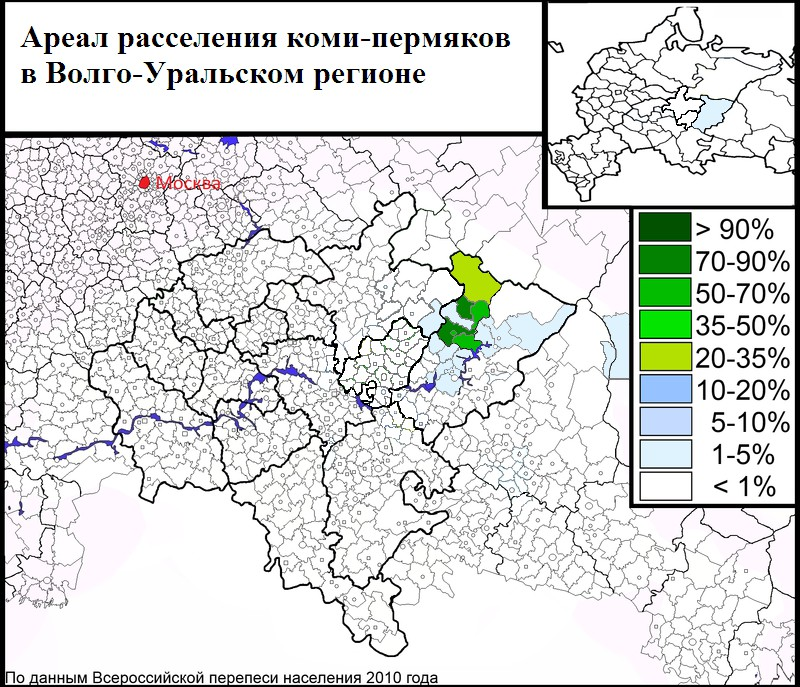 Ареал расселения коми-пермяков в Волго-Уральском регионе (по данным Всероссийской переписи 2010 года)